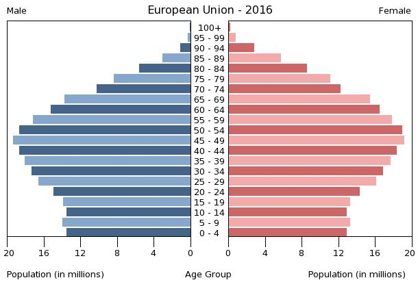 Bevölkerung der EU